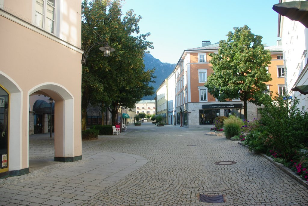 Poststraße (Höhe Salzmeierhaus/Polizei), Blickrichtung Süden in 83435 Bad Reichenhall